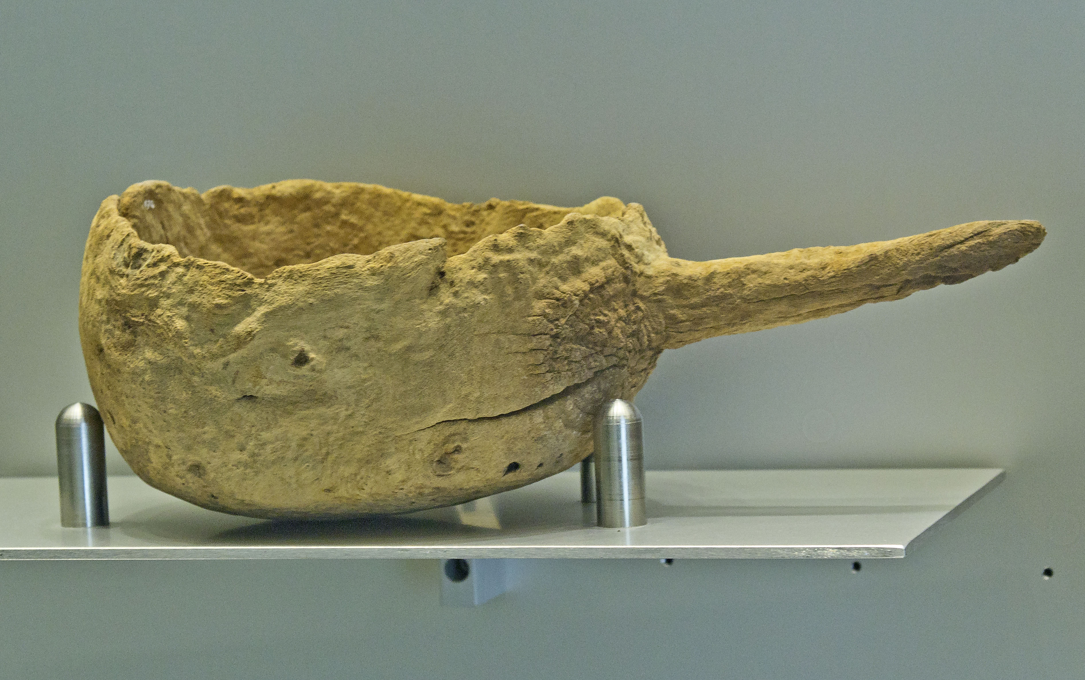 Santa Cruz de Tenerife (Spanien). Museo de la Naturaleza y el Hombre - Guanche Sammlung: Holzgefäß